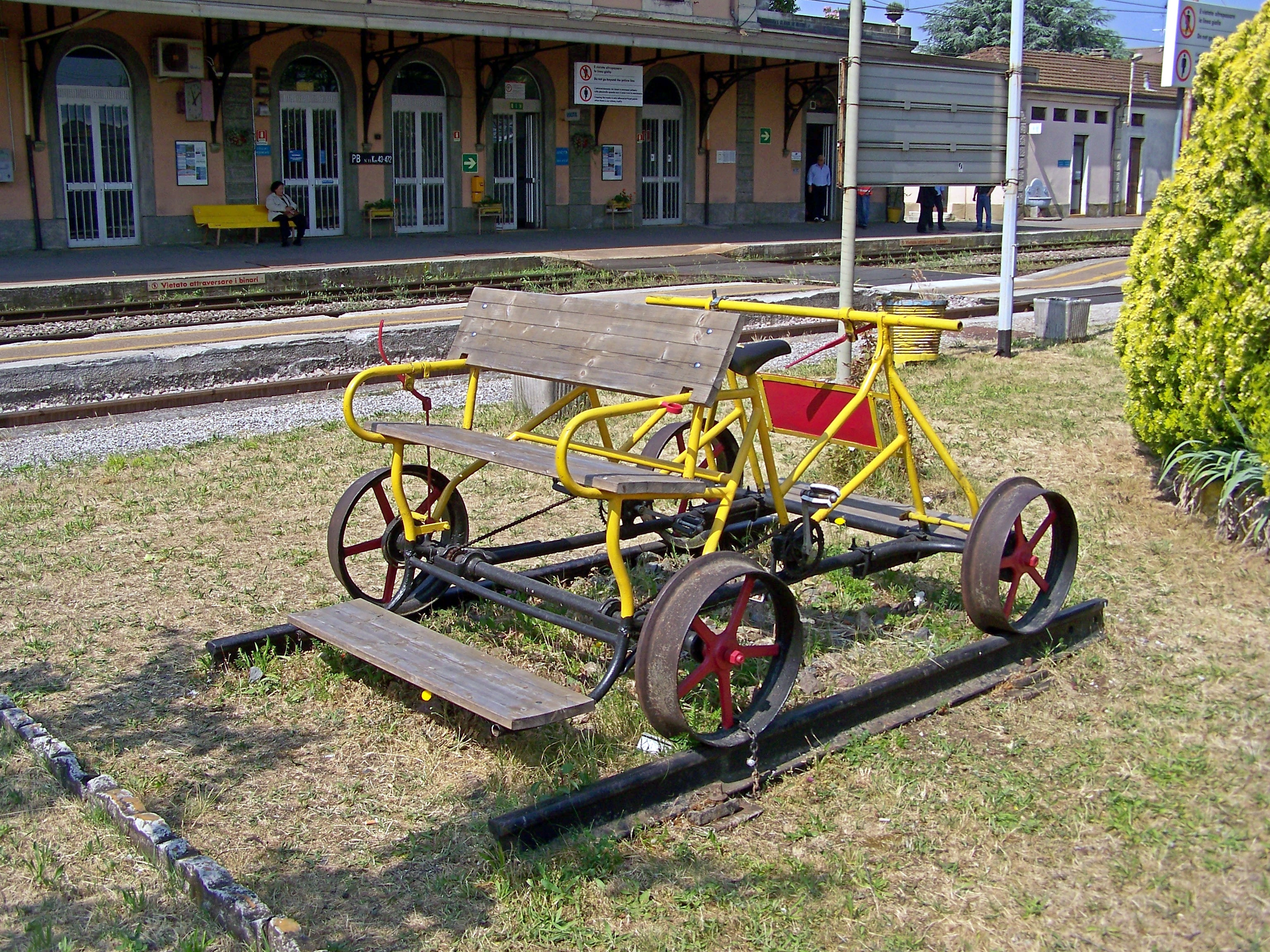 La draisina a pedali per effettuare manutenzioni in linea, monumentata presso la stazione di Palazzolo sull'Oglio.